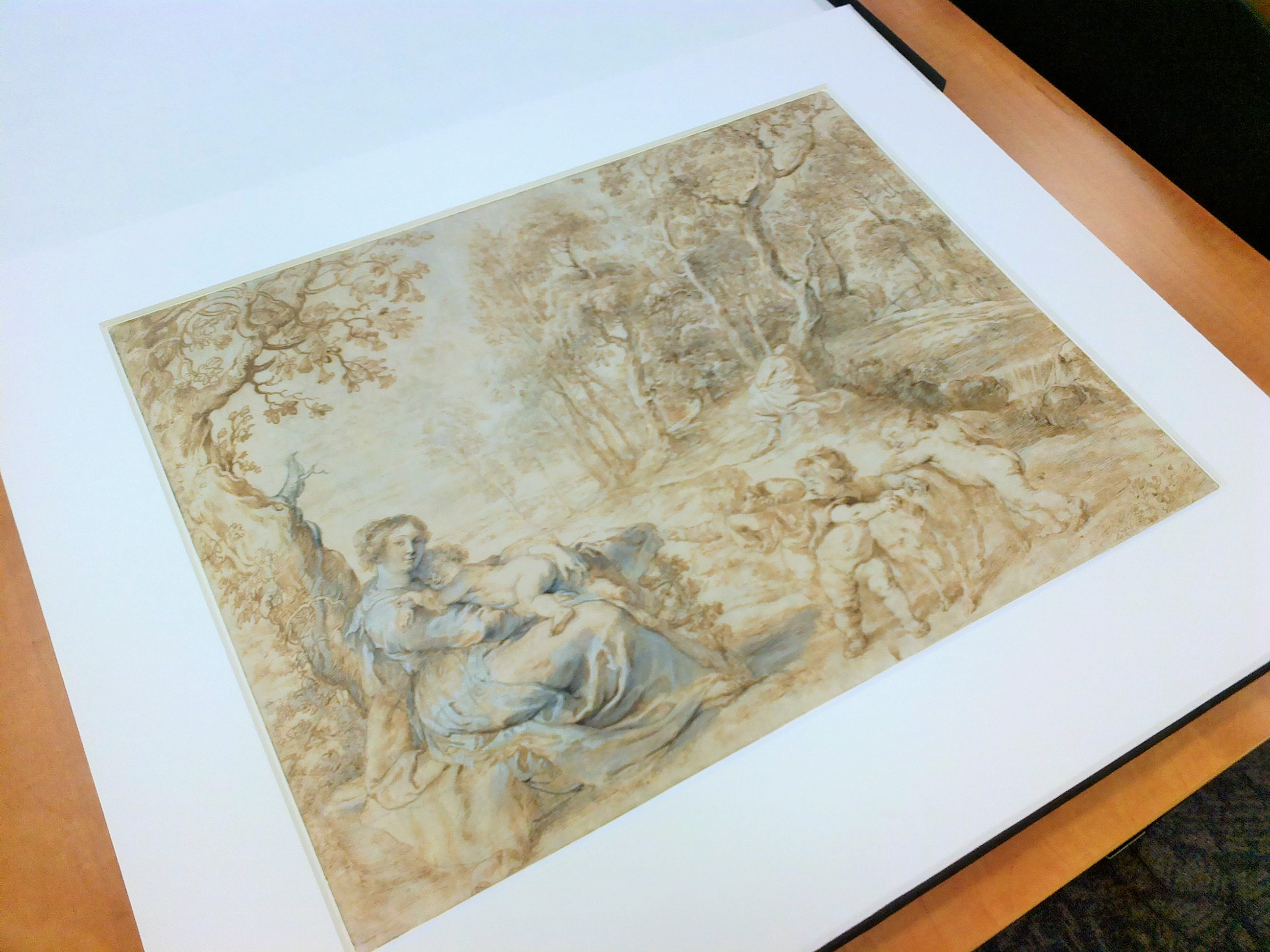 Muzeum Narodowe w Poznaniu